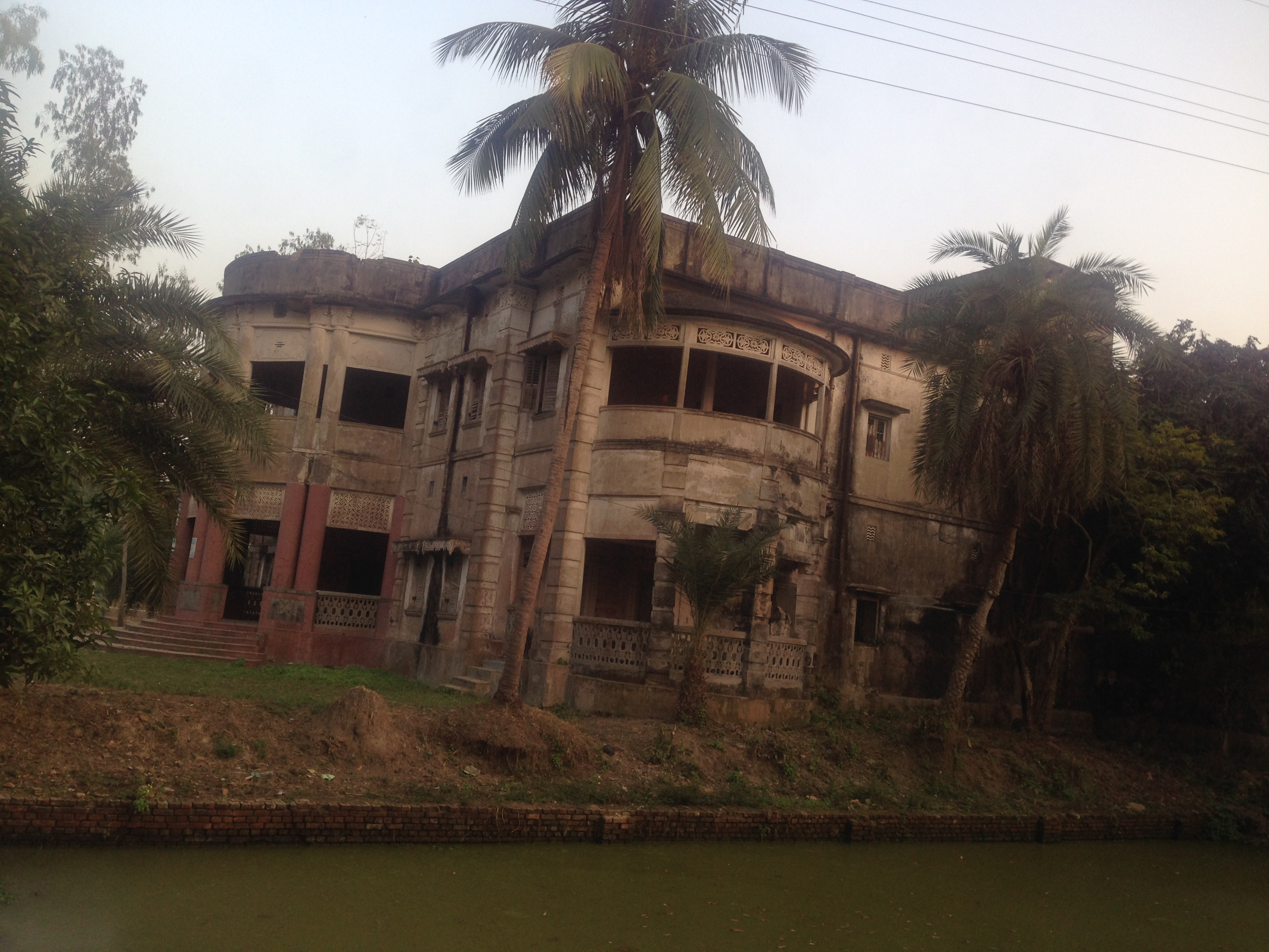 পুকুর পাড় হতে গুনাহার জমিদার বাড়ির দৃশ্য